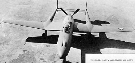 Vultee XP-54 Swoose Goose